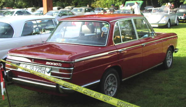 BMW 2000 tii